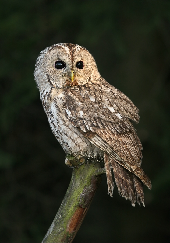 Strix aluco, Žďárské vrchy, CZ